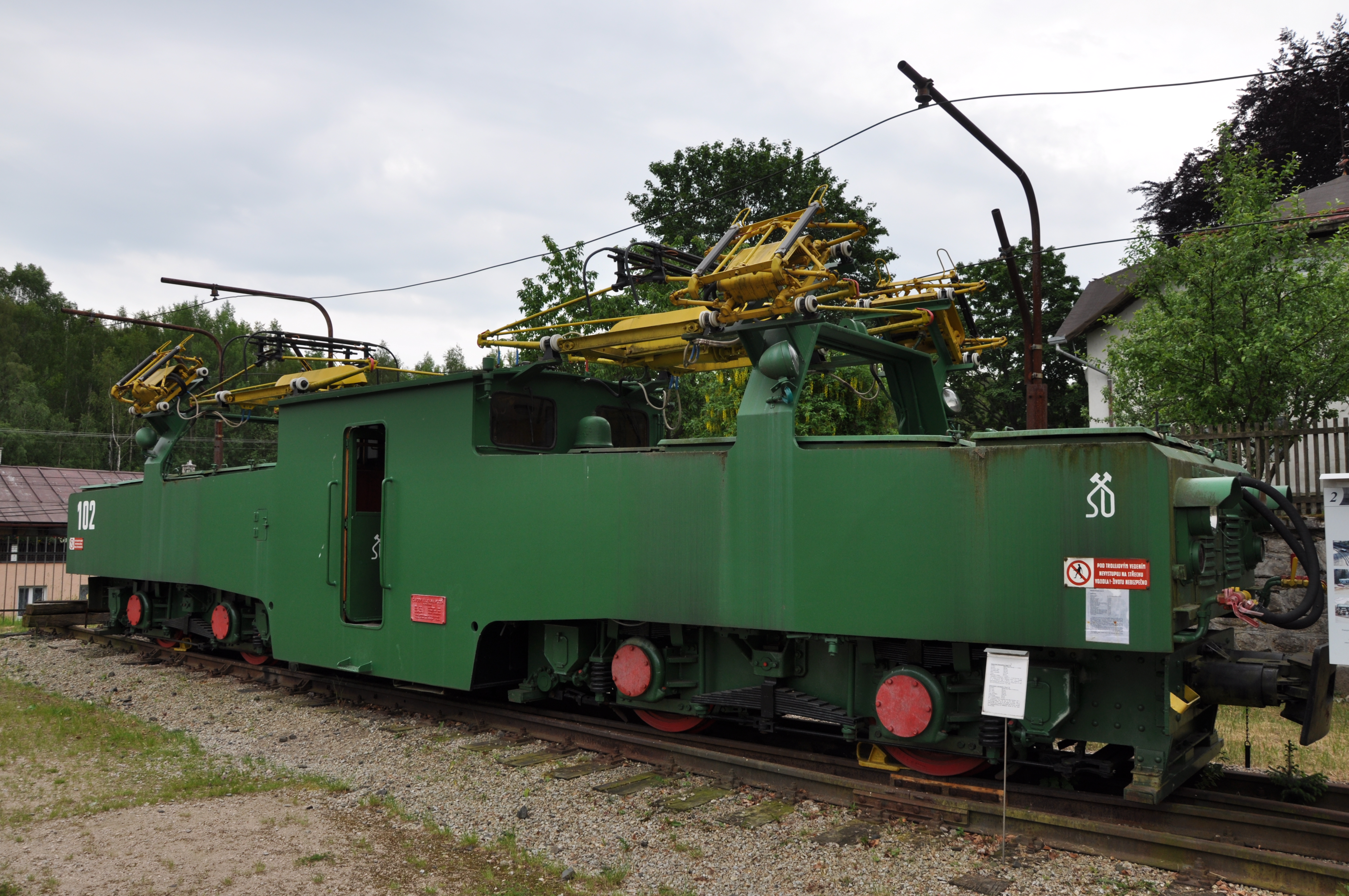 elektrická lokomotiva 17 E (Škoda Plzeň, Závody V. I. Lenina) rozchod 900 mm, výkon 500 kW, maximální rychlost 45 km/h, používána 1959-2003, váha 64 tun